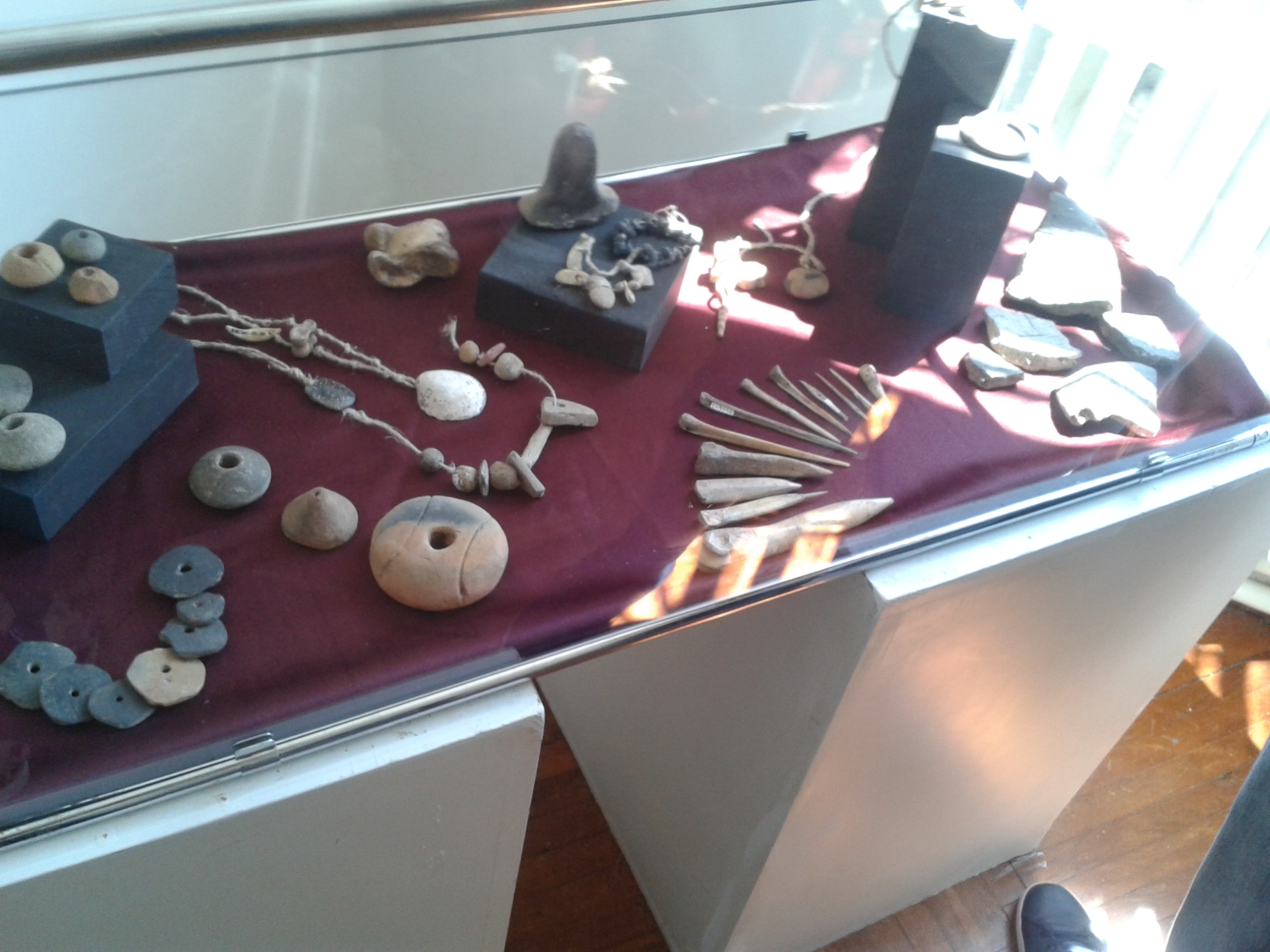 Srpski (latinica): Izlozba u muzeju u Trsteniku